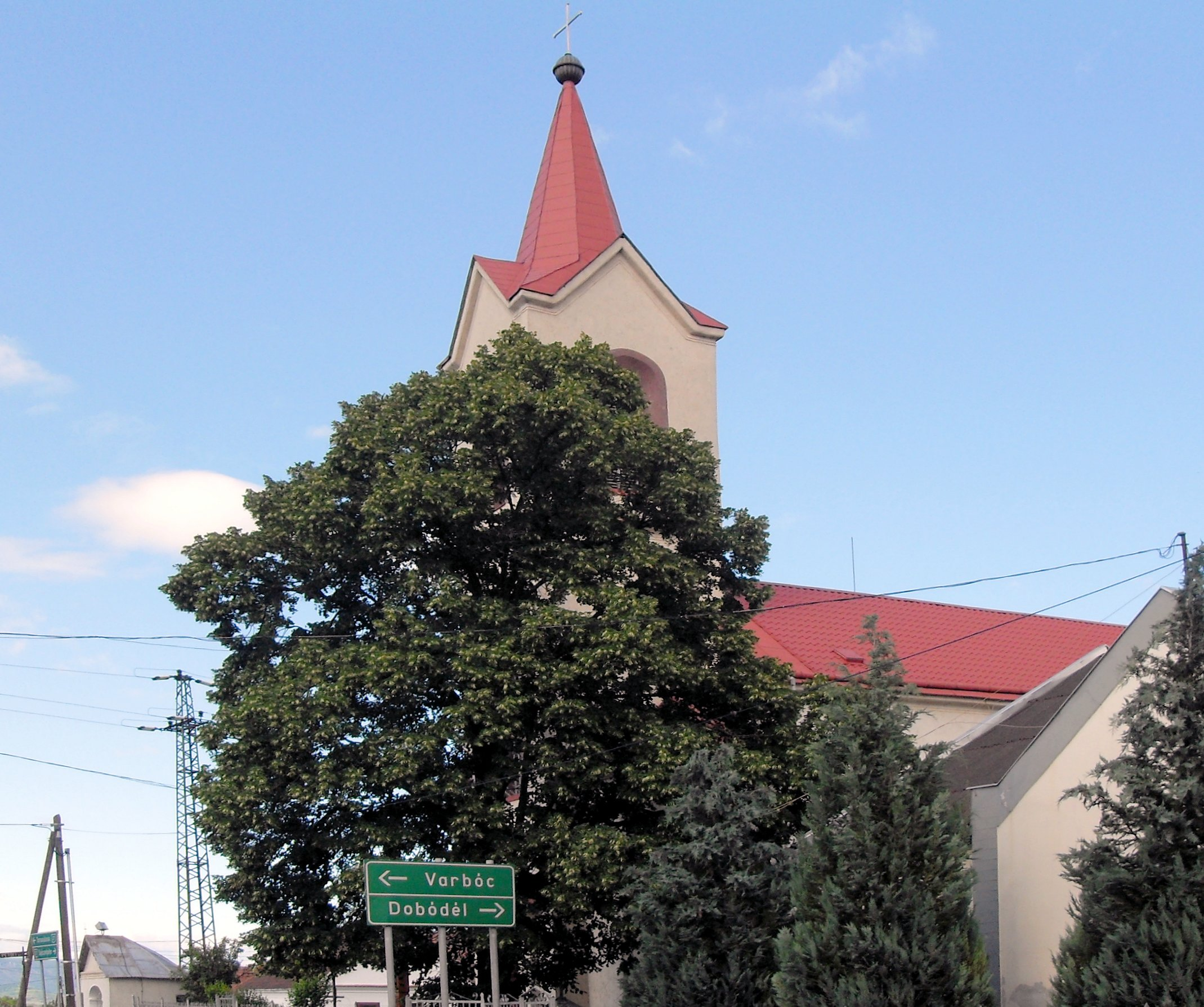 Szent Istvan Kiraly templom Perkupa